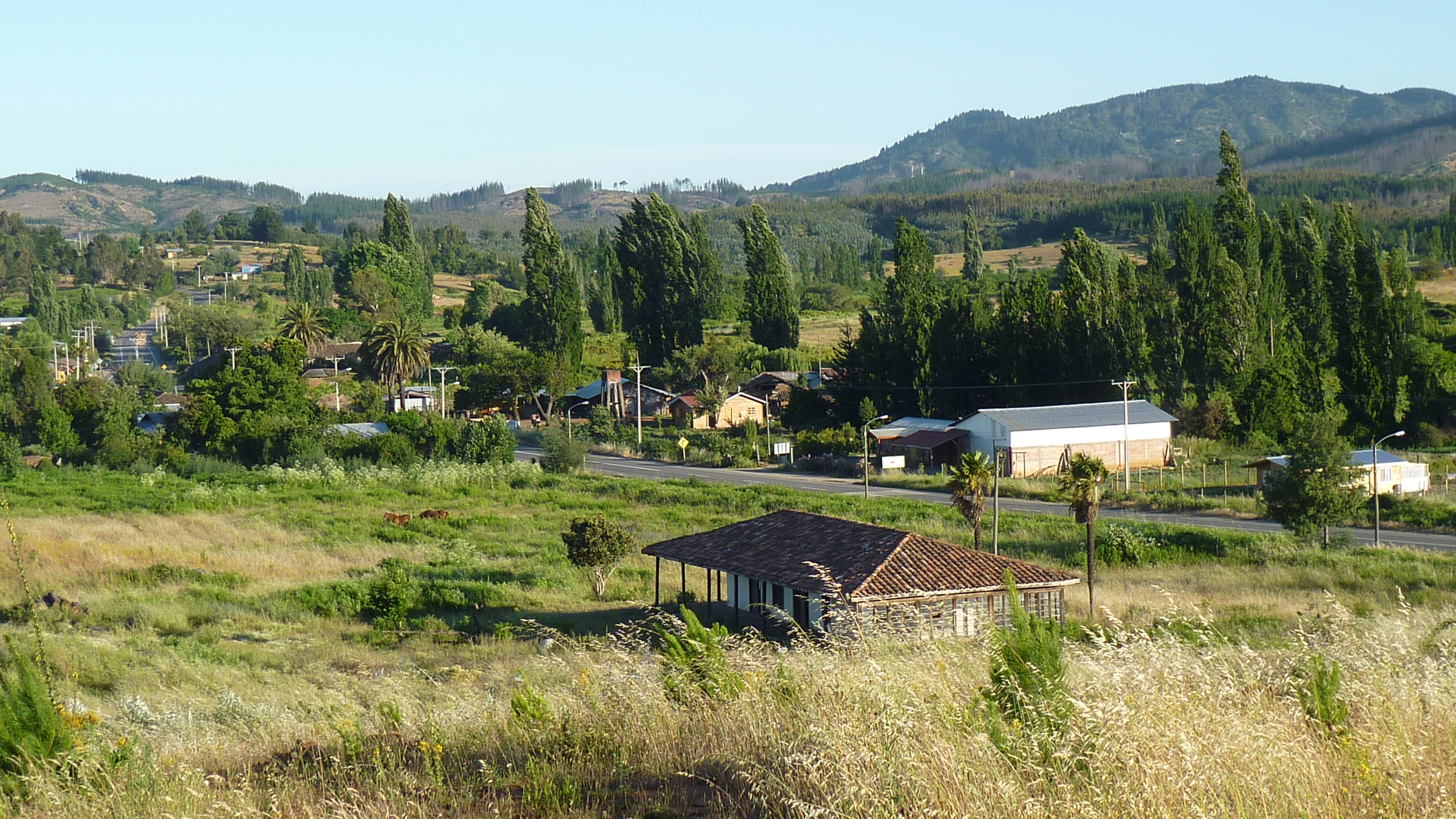 Foto tomada desde los altos de vegas de concha, direccion sur.